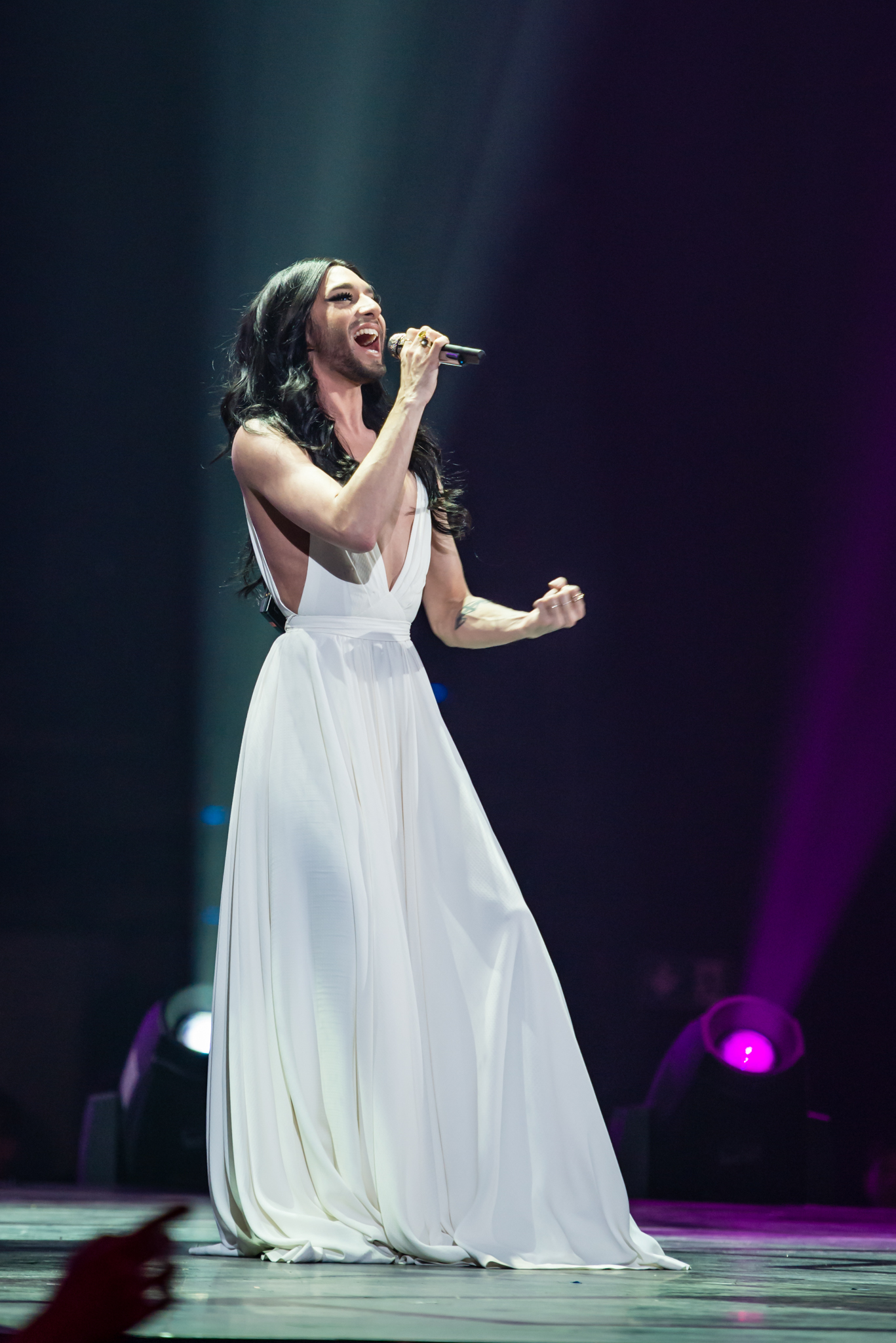 'Eurovision Song Contest 2015 - Unser Song für Österreich Live Show': 'Conchita Wurst'